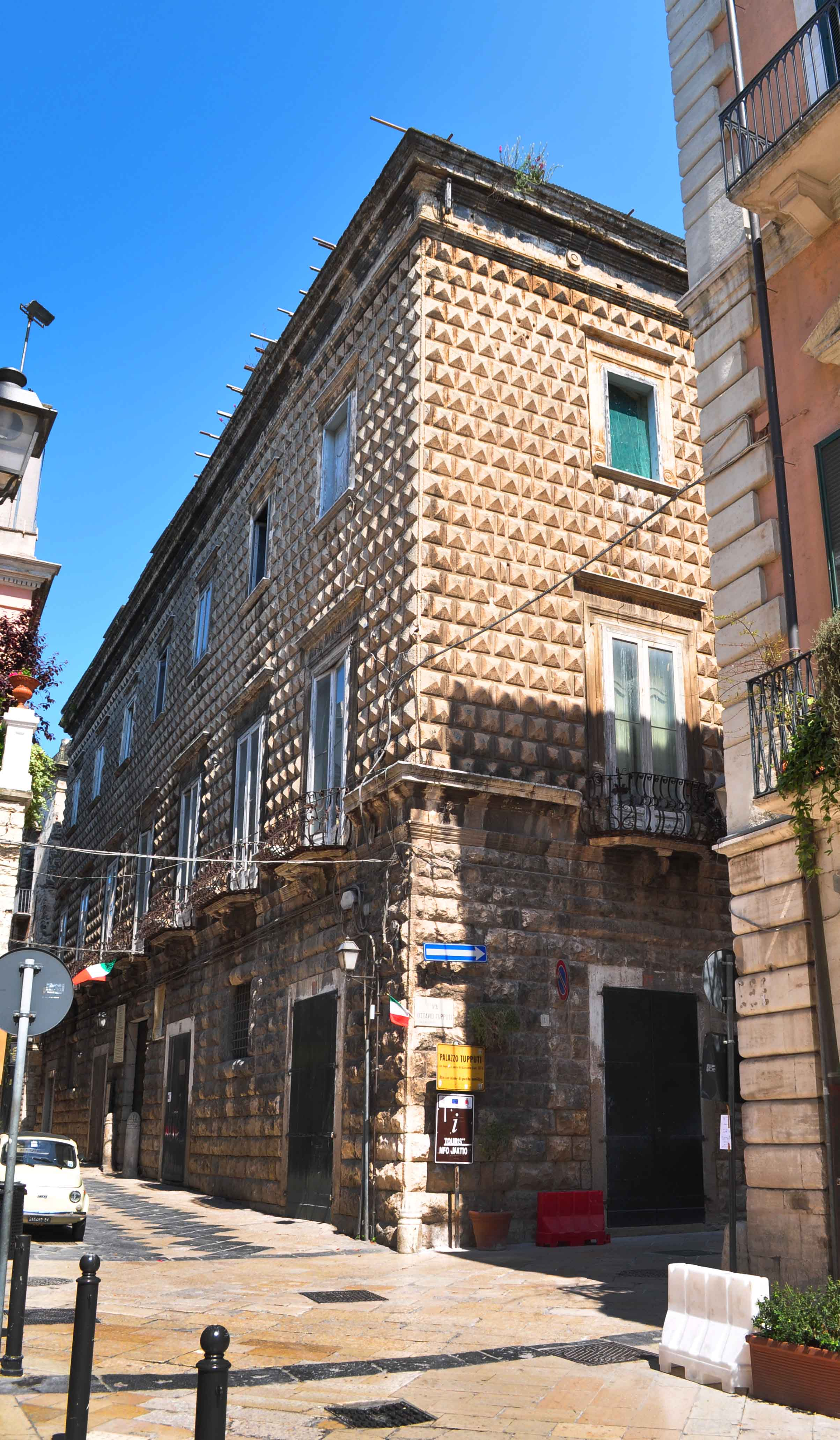 Palazzo Tupputi